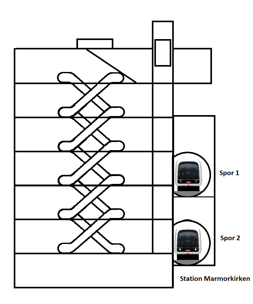 Roltrappenhuis met metro's langs de perrons gezien uit het zuiden